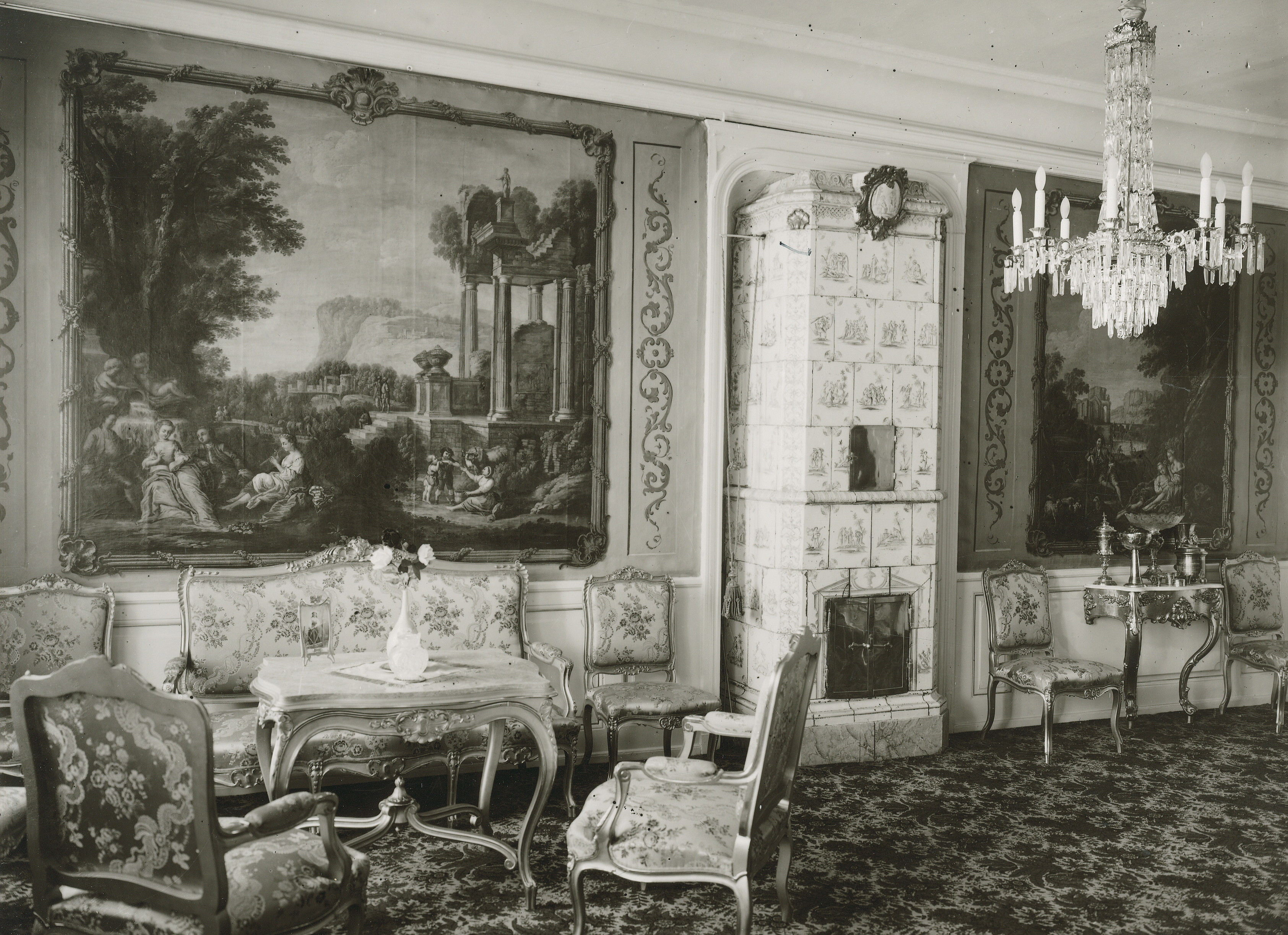 Stora Nygatan 22, vån. 2 tr: rumsinteriör. Väggmålningar med hamnmotiv i rokoko, sannolikt målade av Johan Pasch (1706-1769).